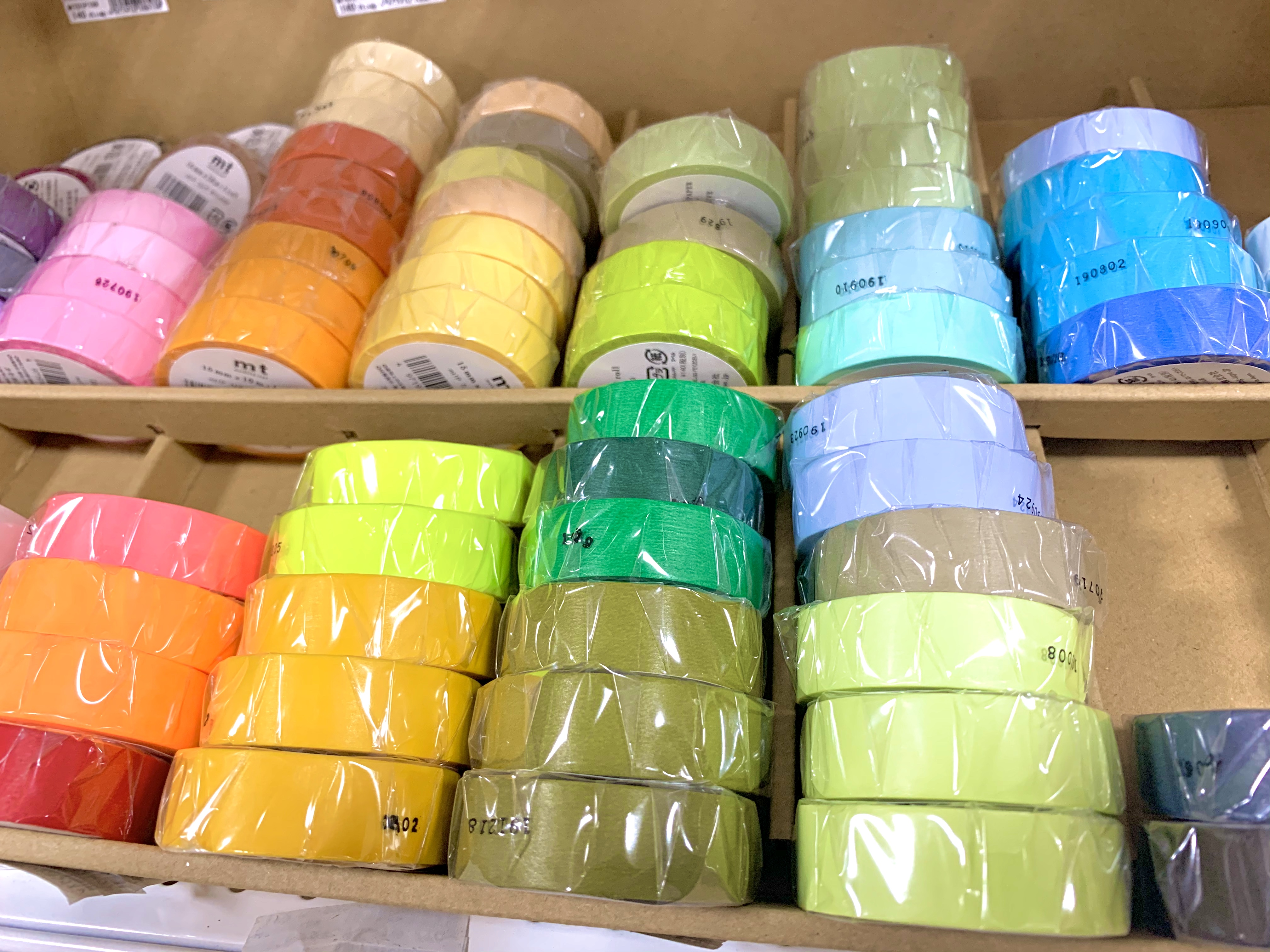 店舗に陳列された色付きのマスキングテープ